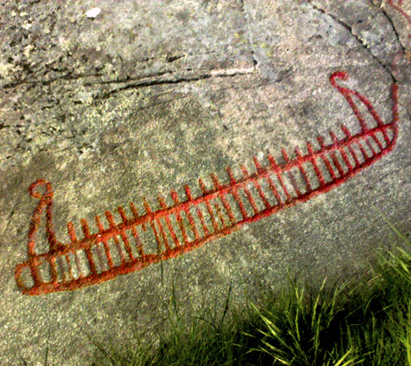 Skeppsristning vid Jätteberget (Raä-nr Skepplanda 56:1) i Skepplanda socken, Ale härad, Ale kommun, Västergötland, Västra Götaland, Sverige.